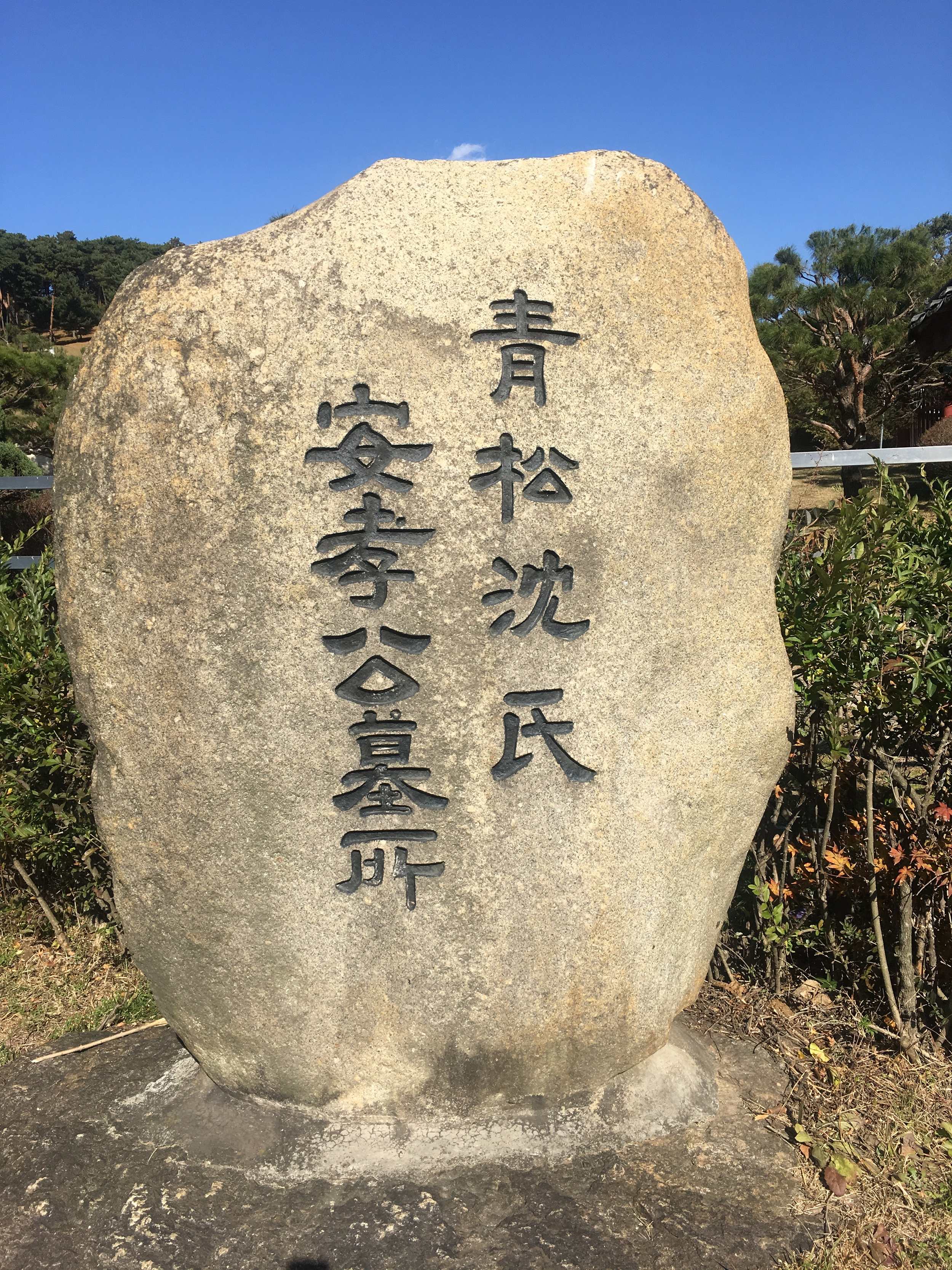 경기도 수원시 영통구 이의동 산13-10 소재 심온(沈溫)선생 묘